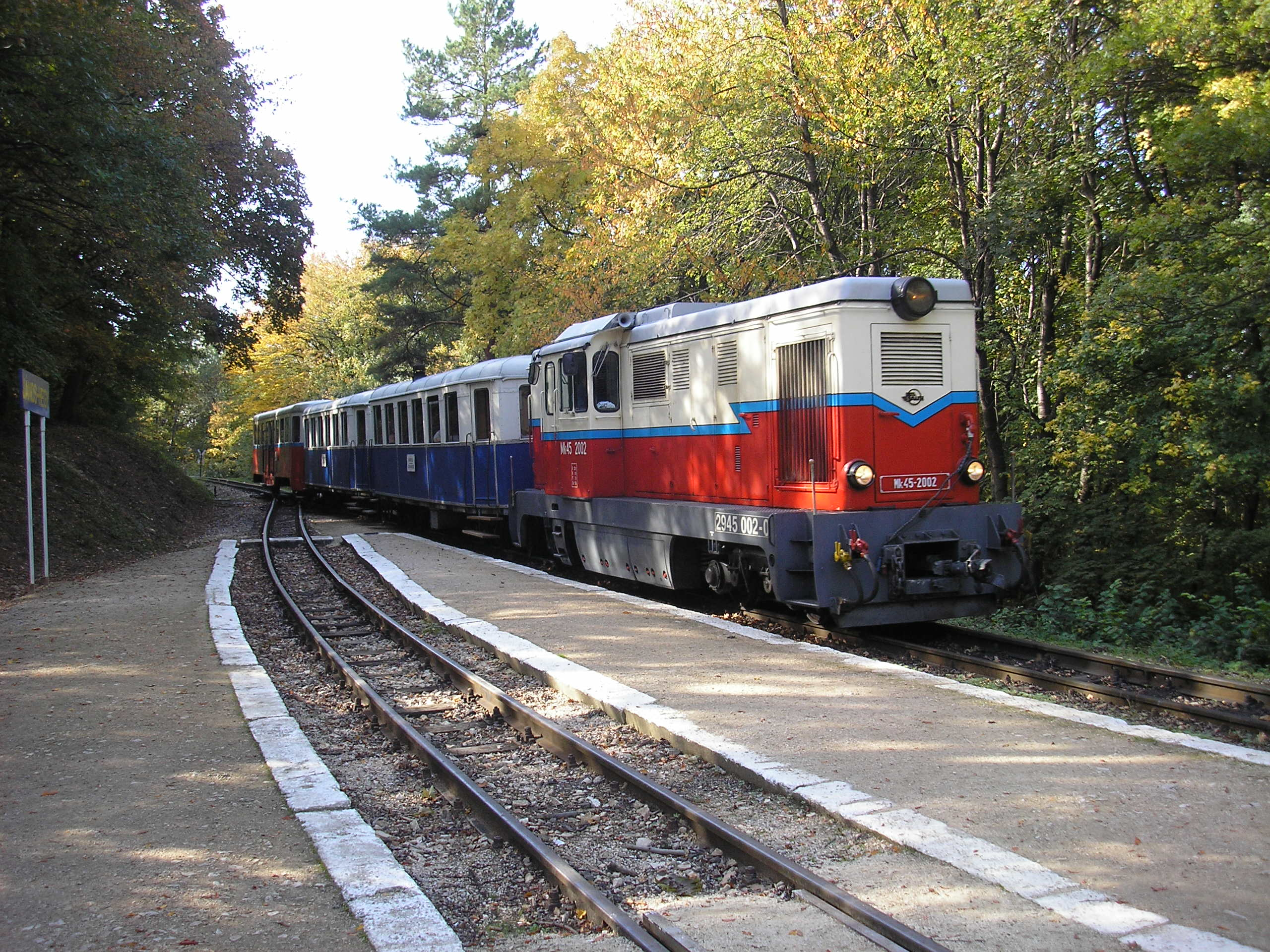 Baureihe Mk45